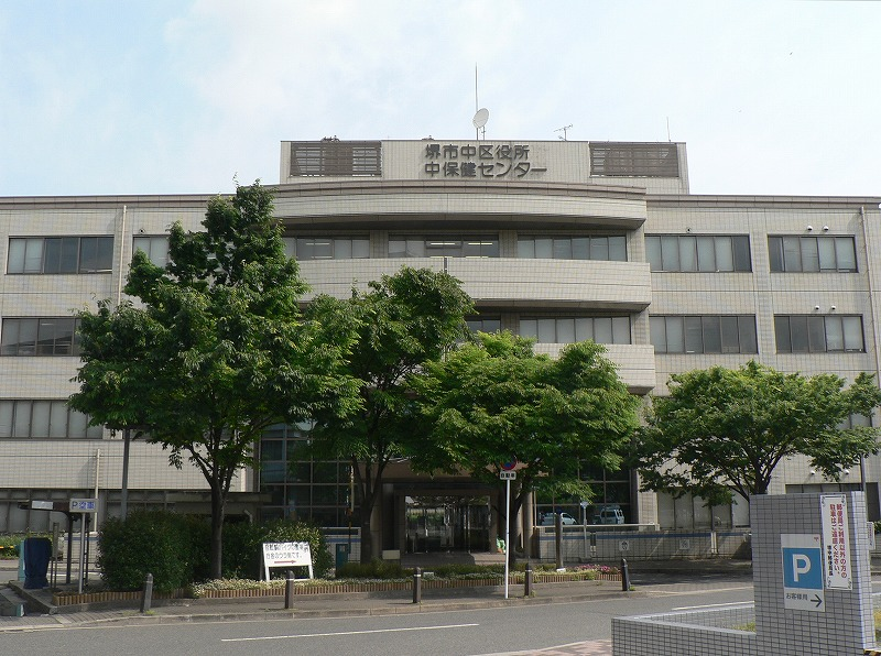 Naka ward office,Sakai city,Osaka,Japan（大阪府堺市中区役所）